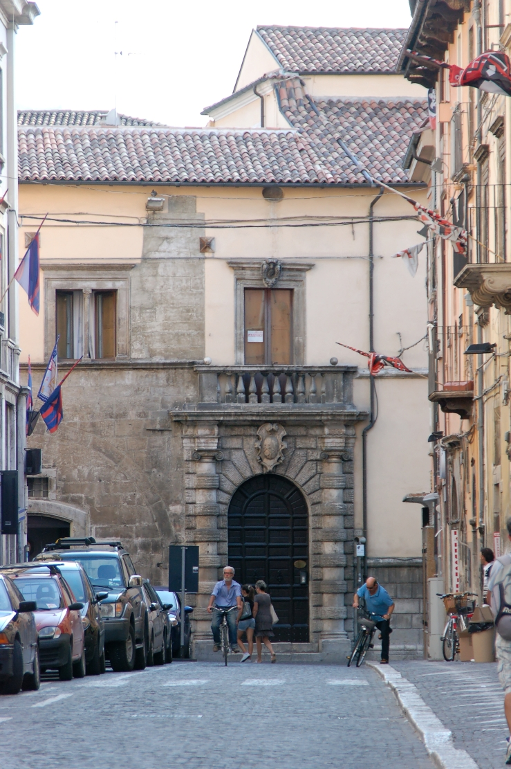 Sulmona 2011